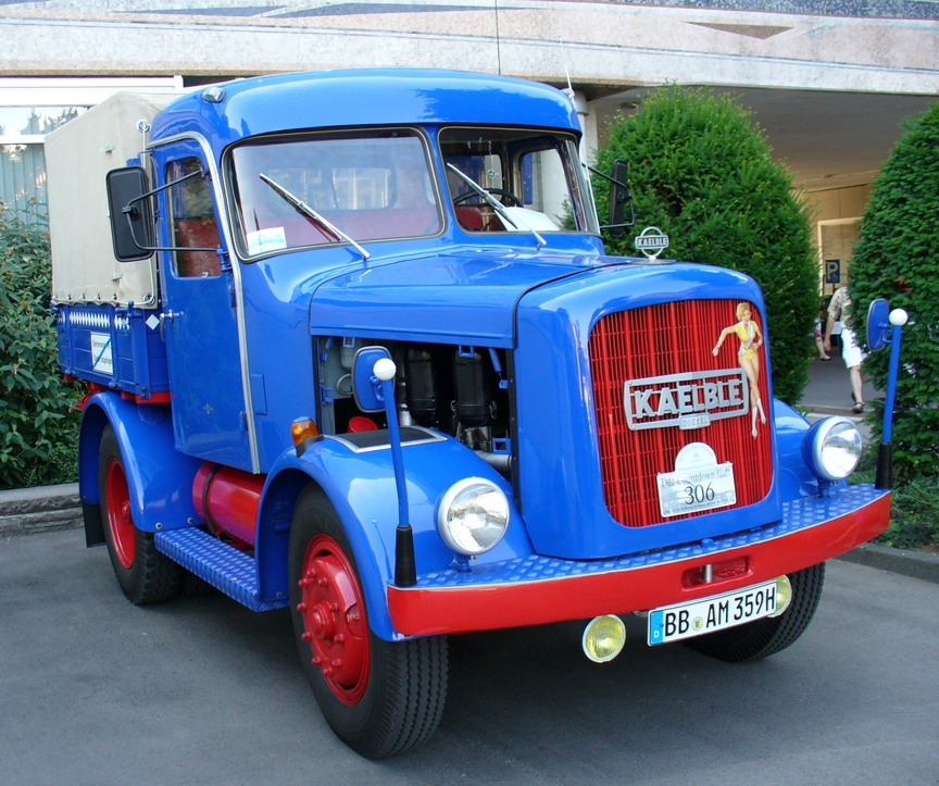 Kaelble Zugmaschine 70 Kw (95 PS), Baujahr 1958, 2005 in Stuttgart-Untertürkheim